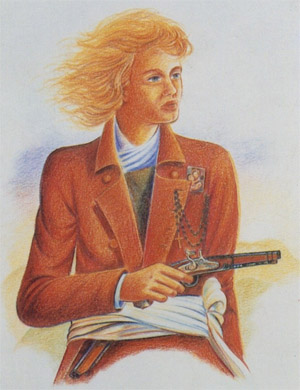 Jean Jan - This image is a work of fiction and does not correspond to known descriptions of Jean Jan